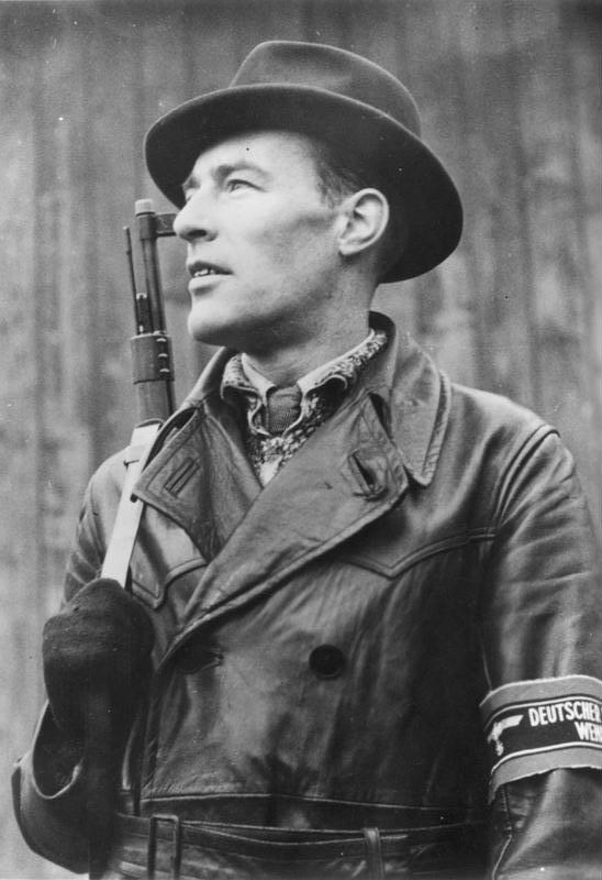 PK-H 6365 Die neue Volkssturmarbinde Die bisherigen behelfsmäßigen Armbinden der Völkssturmmänner werden nun durch eine andersfarbige neue Binde abgelöst. Die Armbinden sind bereits in der Fertigung und zum Teil schon an Volkssturmeinheiten ausgegeben worden. Foto: SS-PK-Kriegsberichter Wauer/TOP -EP(S) 5.12.44 [Herausgabedatum]